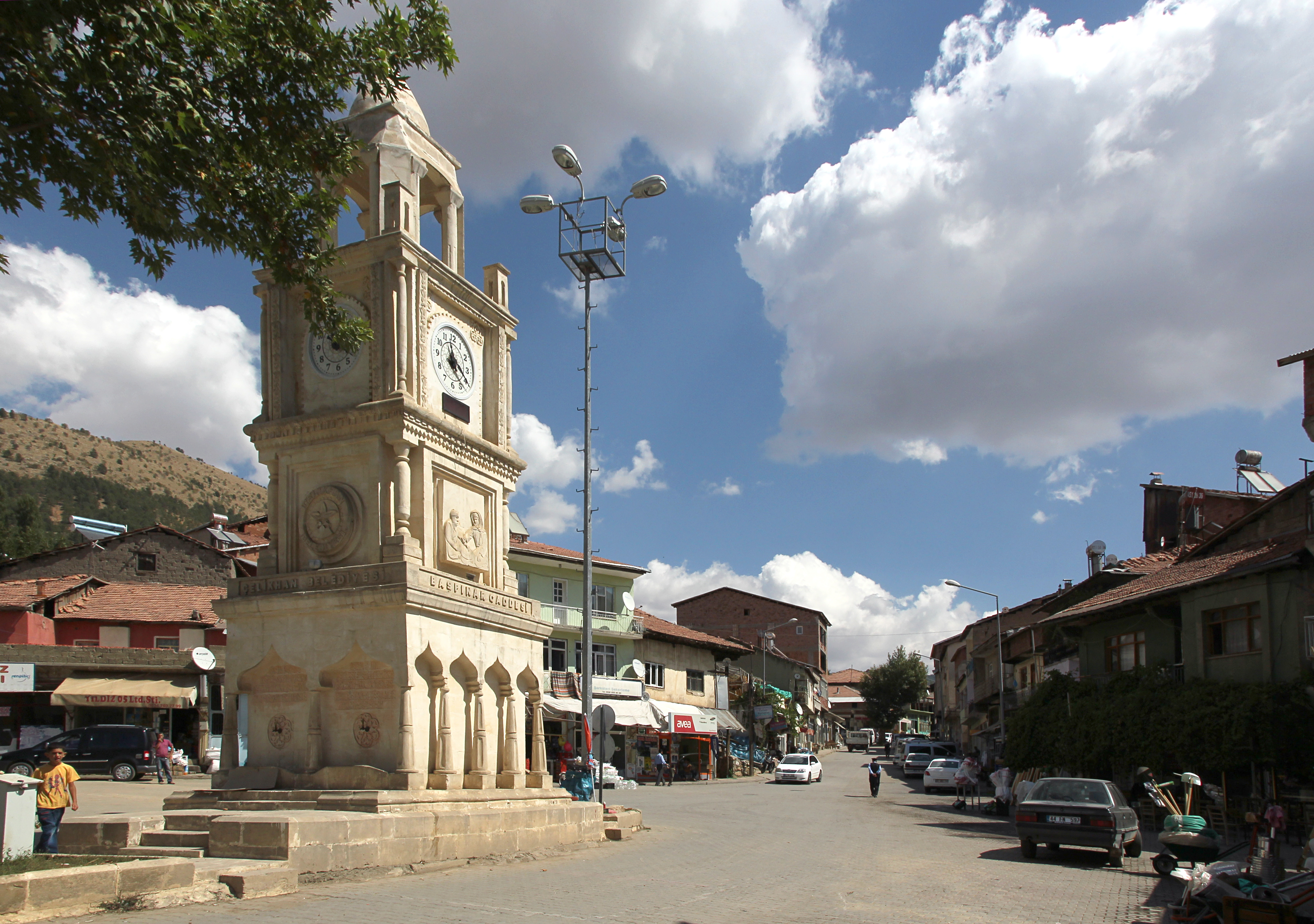 Uhrturm in Çelikhan, Provinz Adıyaman, Türkei